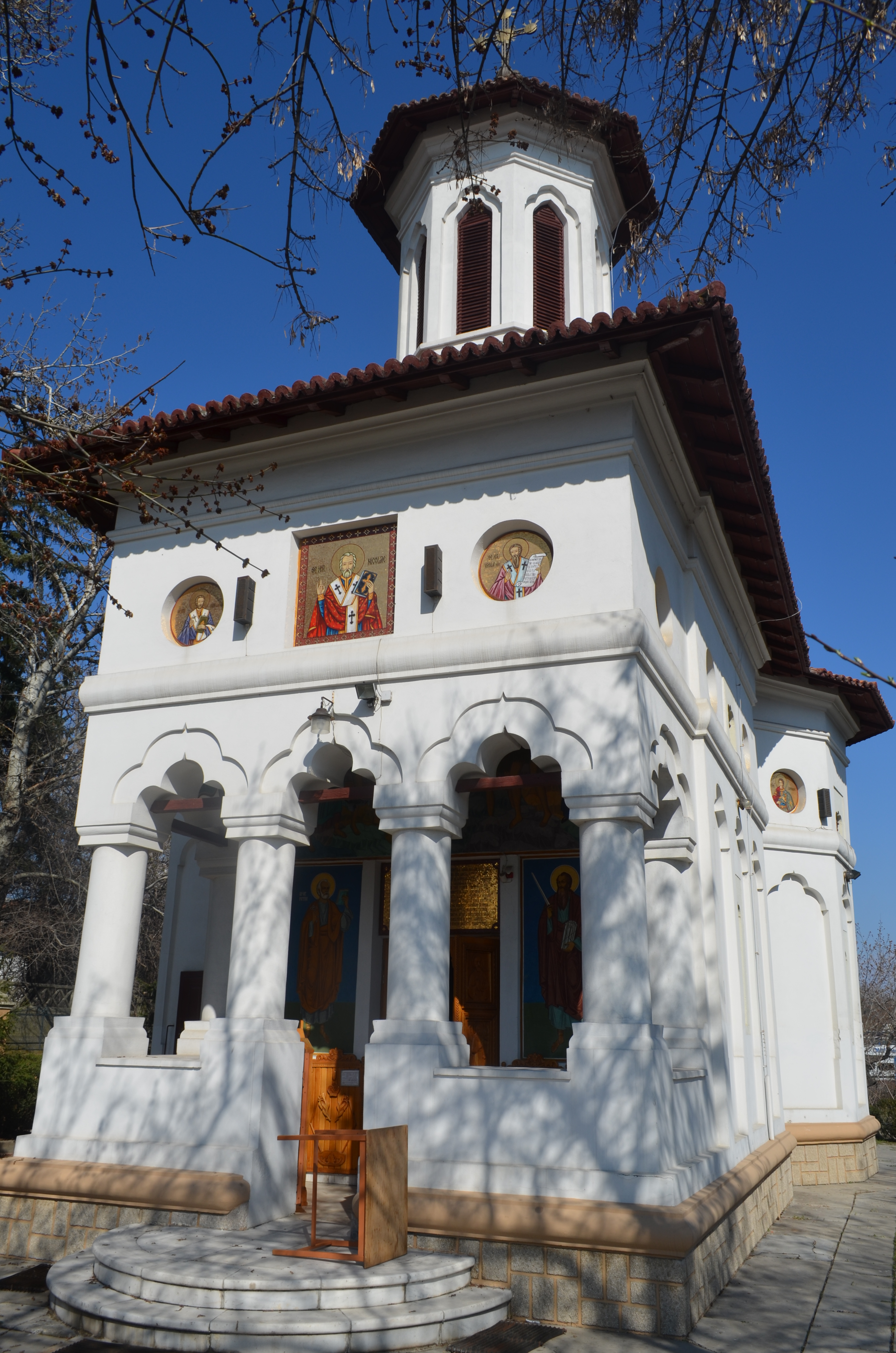 Biserica Sfântul Nicolae, Băneasa